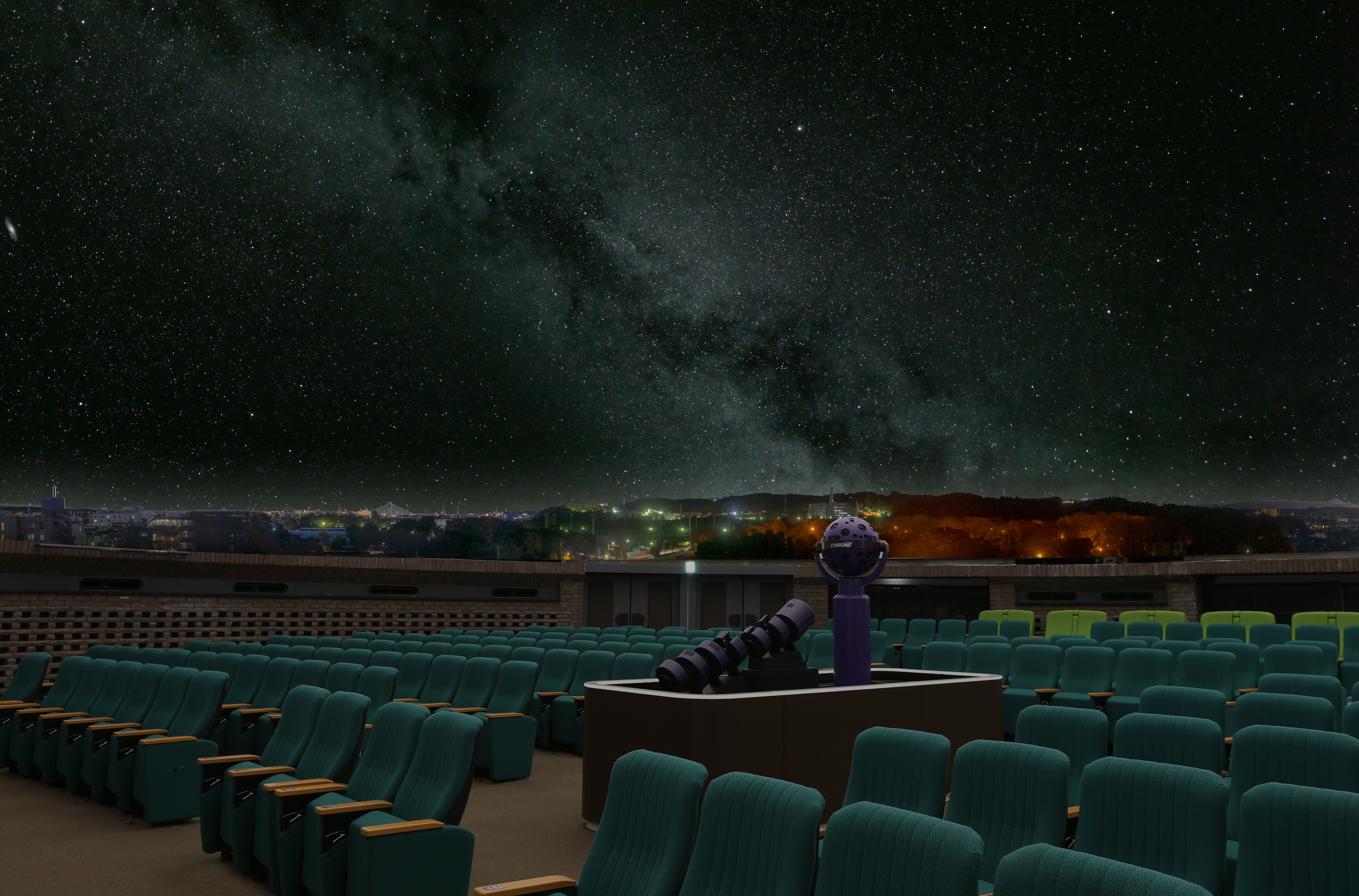 2018年リニューアルされたプラネタリウム